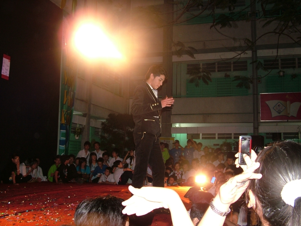 Noo Phước Thịnh trình diễn tại trường Trung học Cơ sở Phan Tây Hồ, Gò Vấp, Thành phố Hồ Chí Minh, Việt Nam năm 2010.